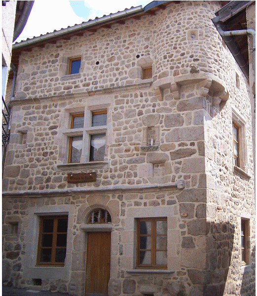 Viverols